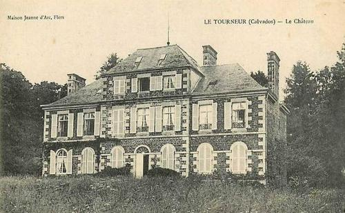 Le Tourneur (Calvados, France) - Château des Noyers.